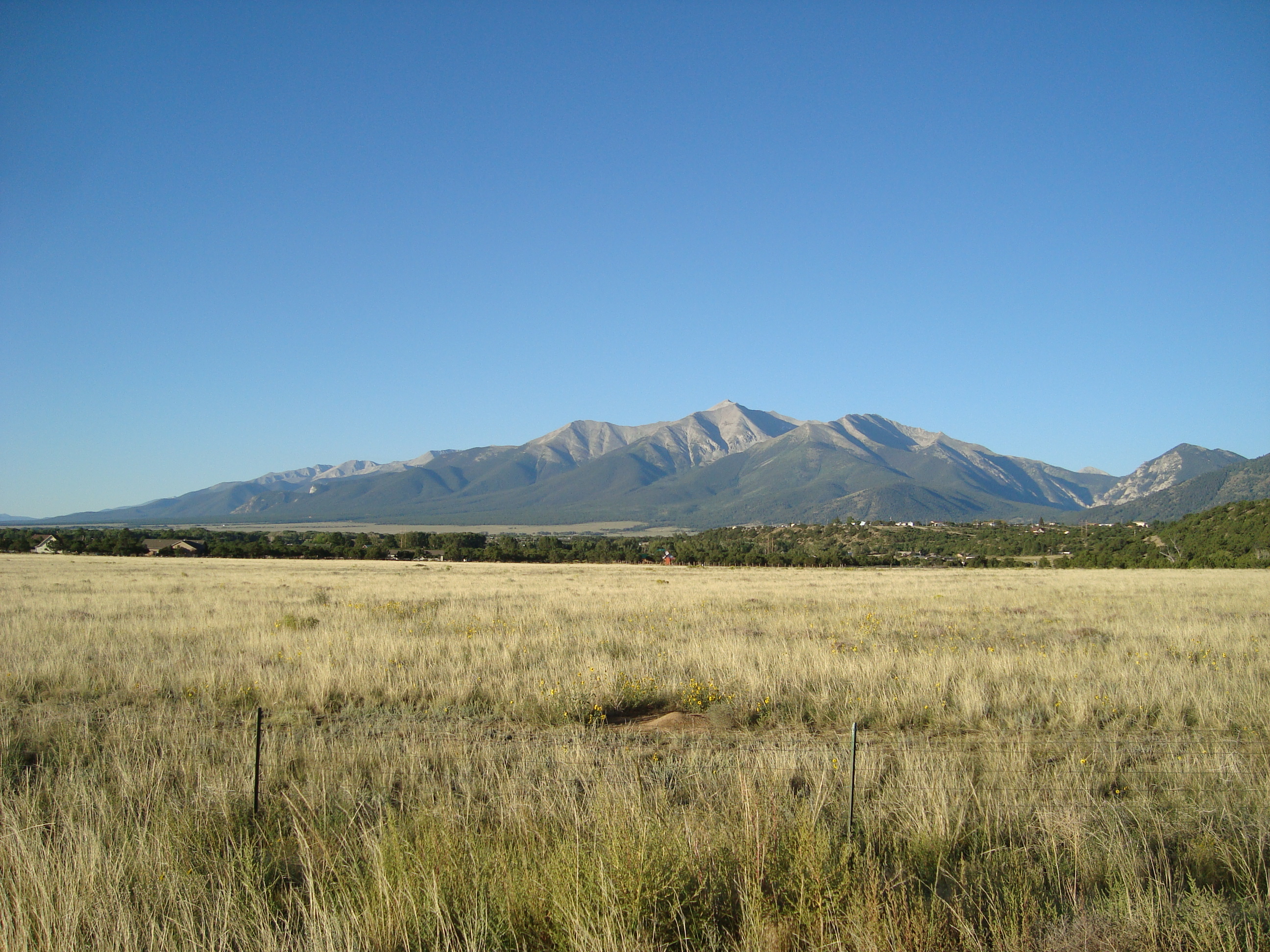 Mount Harvard from Route 24